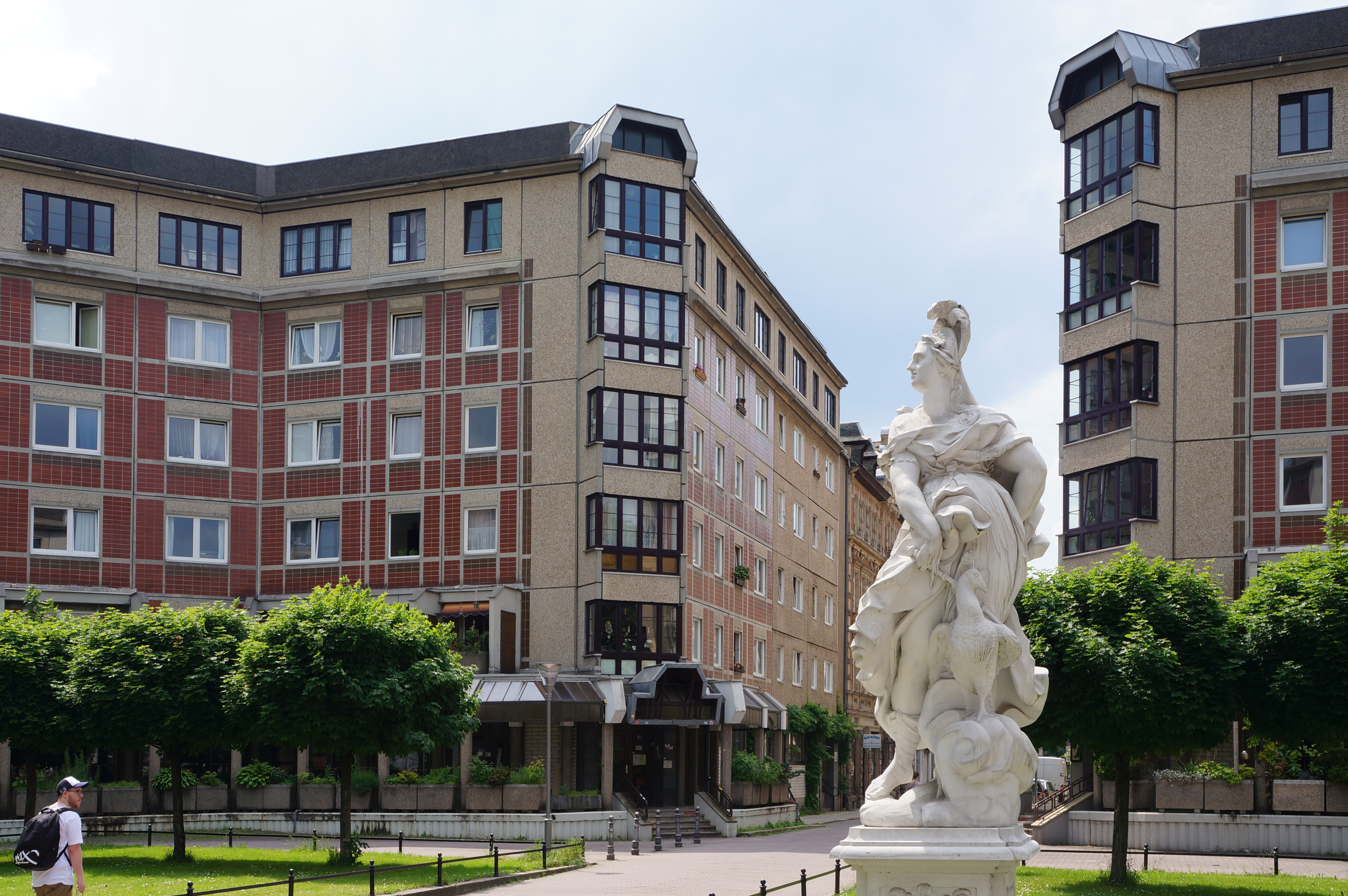 Der Doretheenplatz in der Mitte des Kolonnadenviertels mit Anfang der Kolonnadenstraßen und Permoser-Statue.